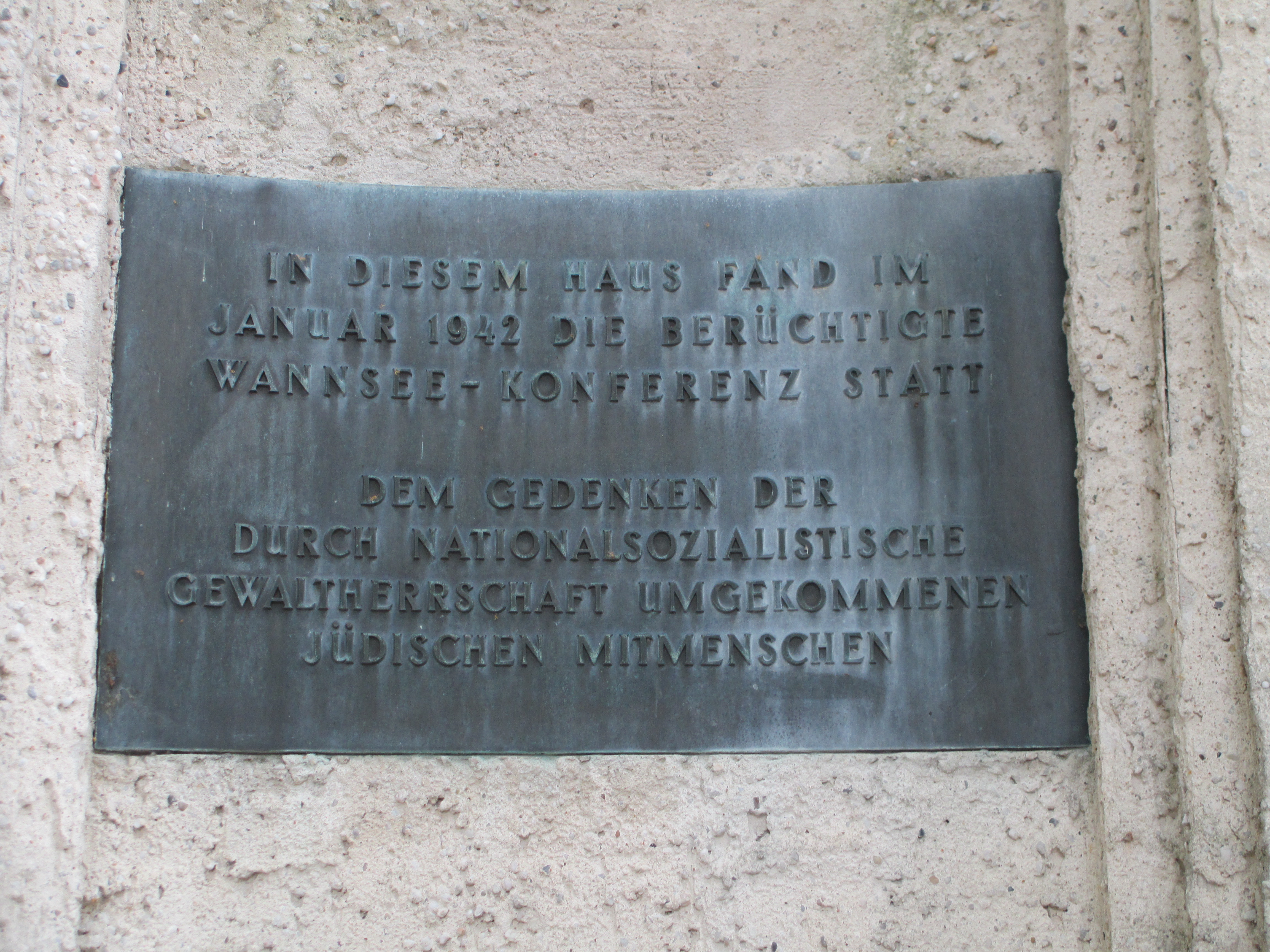 לוחית זיכרון בכניסה לווילה ואנזה